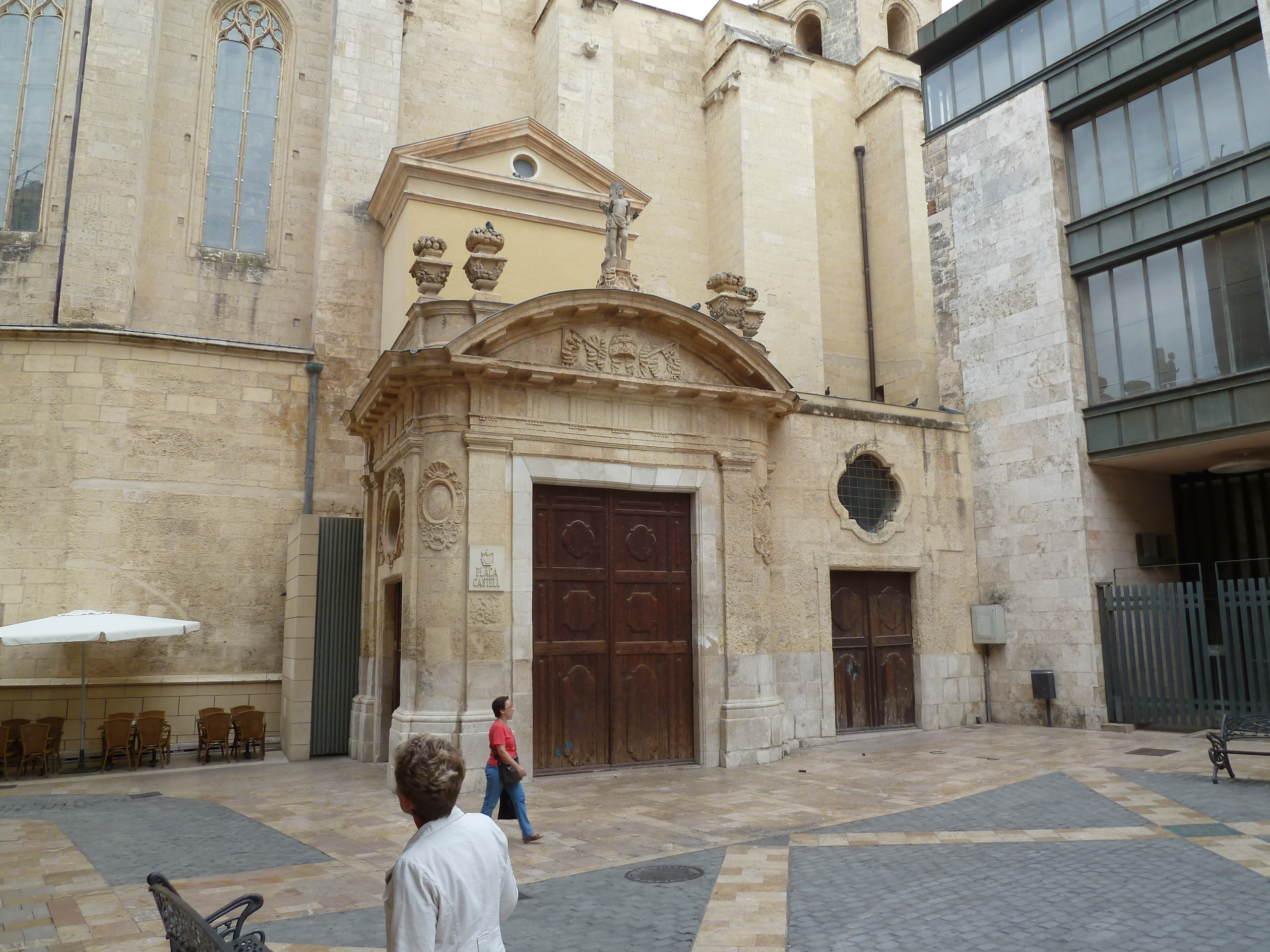 Reus